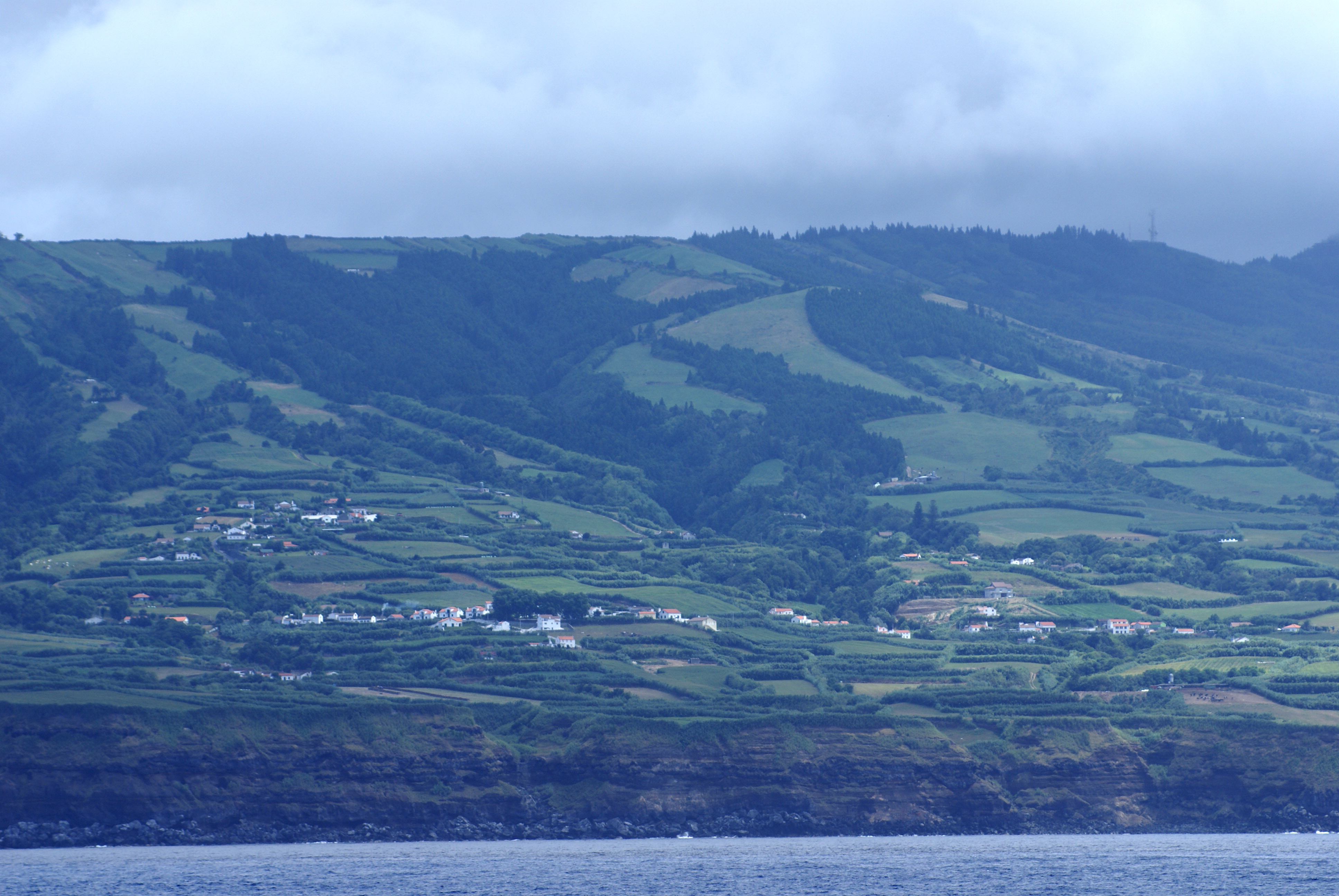 Lomba do Gago, Ginetes, vista do mar, Ponta Delgada, ilha de São Miguel, Açores